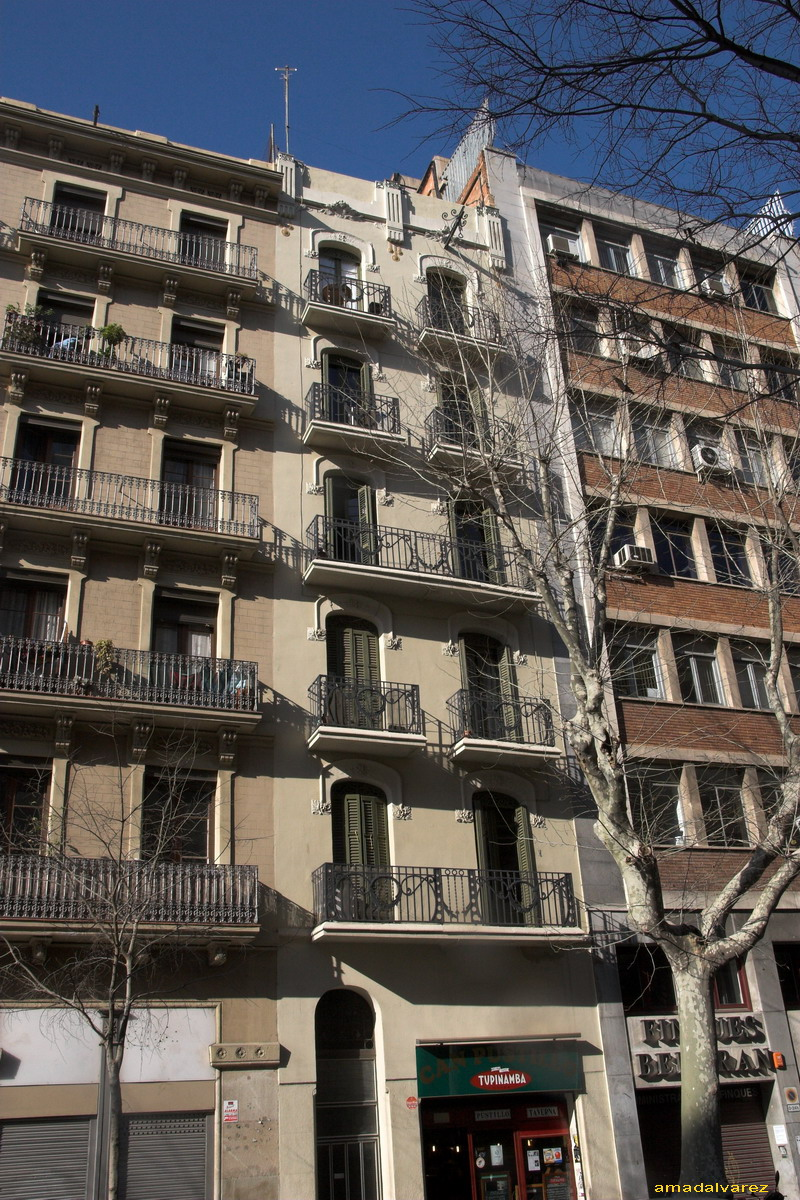 Casa d'habitatges al c/ Consell de Cent 81(Barcelona-Catalunya), obra de Antoni Falguera de 1912